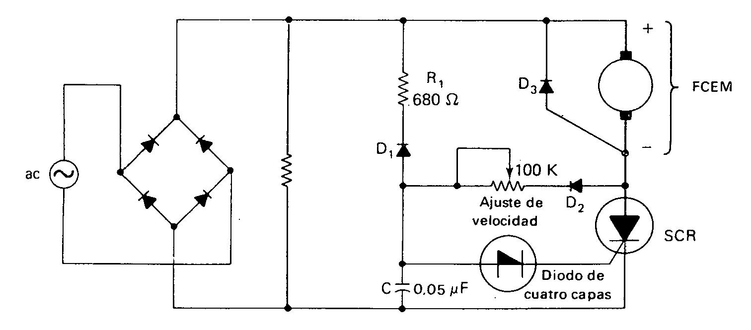 Esquema de Circuito para el Control de Motores